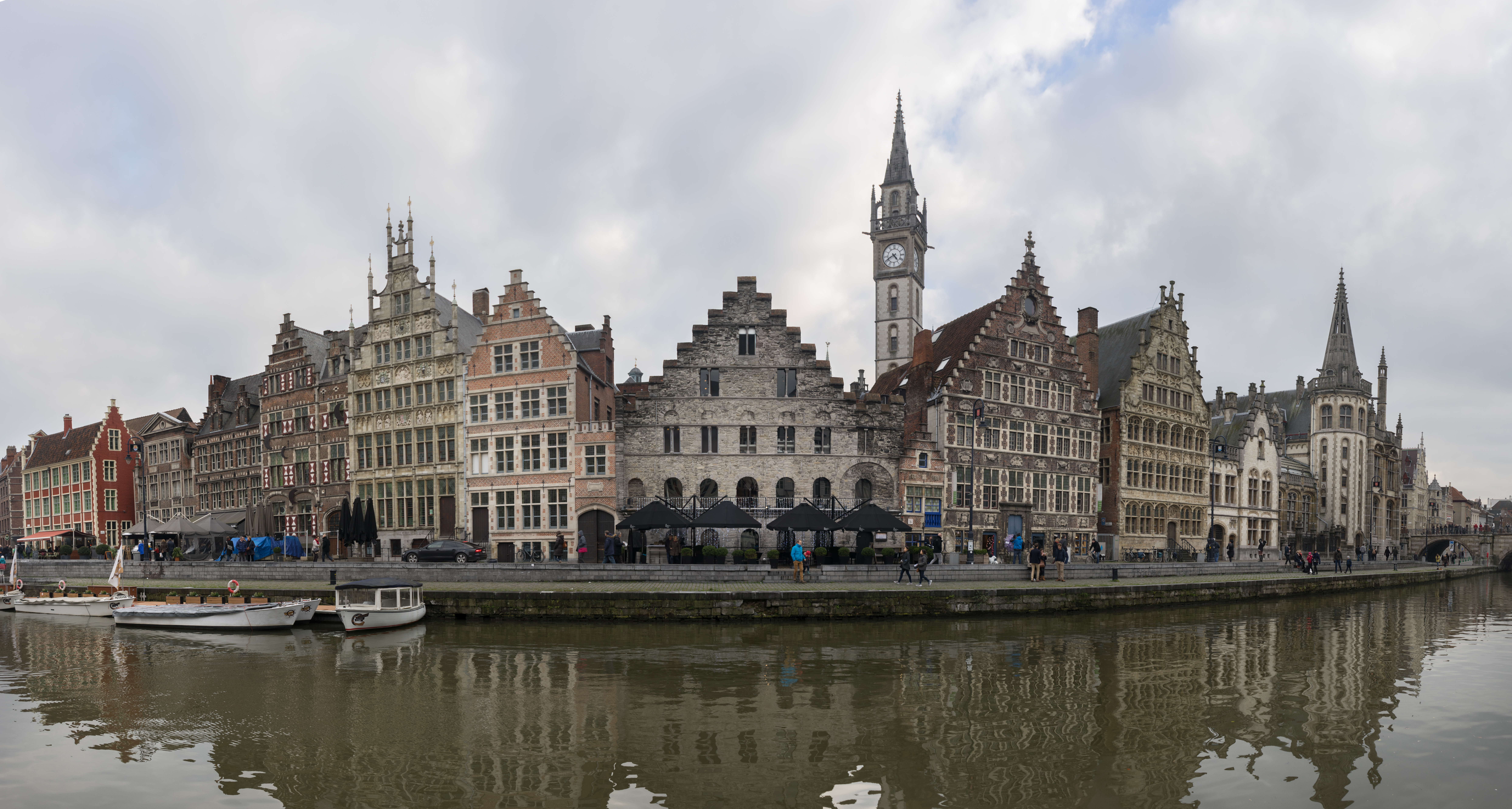 Romaans+stapelhuis%2C+Spijker